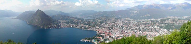 Panorama vom Gipfel des Monte Brè